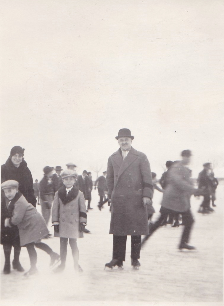 Eislaufbegeisterter Firmenchef, Paul Hakenmüller während der ´Seegfrörne` auf dem Bodensee, 1928